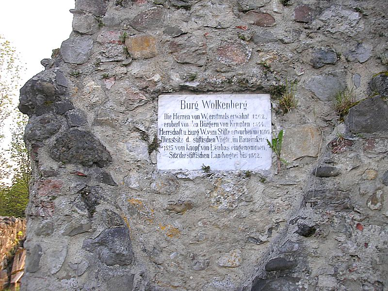 Burg Wolkenberg bei Wildpoldsried (Landkreis Oberallgäu, Bayerisch-Schwaben). Gedenktafel (1926) am Palas. Eigene Aufnahme, Mai 2008 / Wolkenberg castle near Wildpoldsried (Landkreis Oberallgäu, Bavaria, Germany). Commemorative plaque (1926) at the central building. Own photo, May 2008